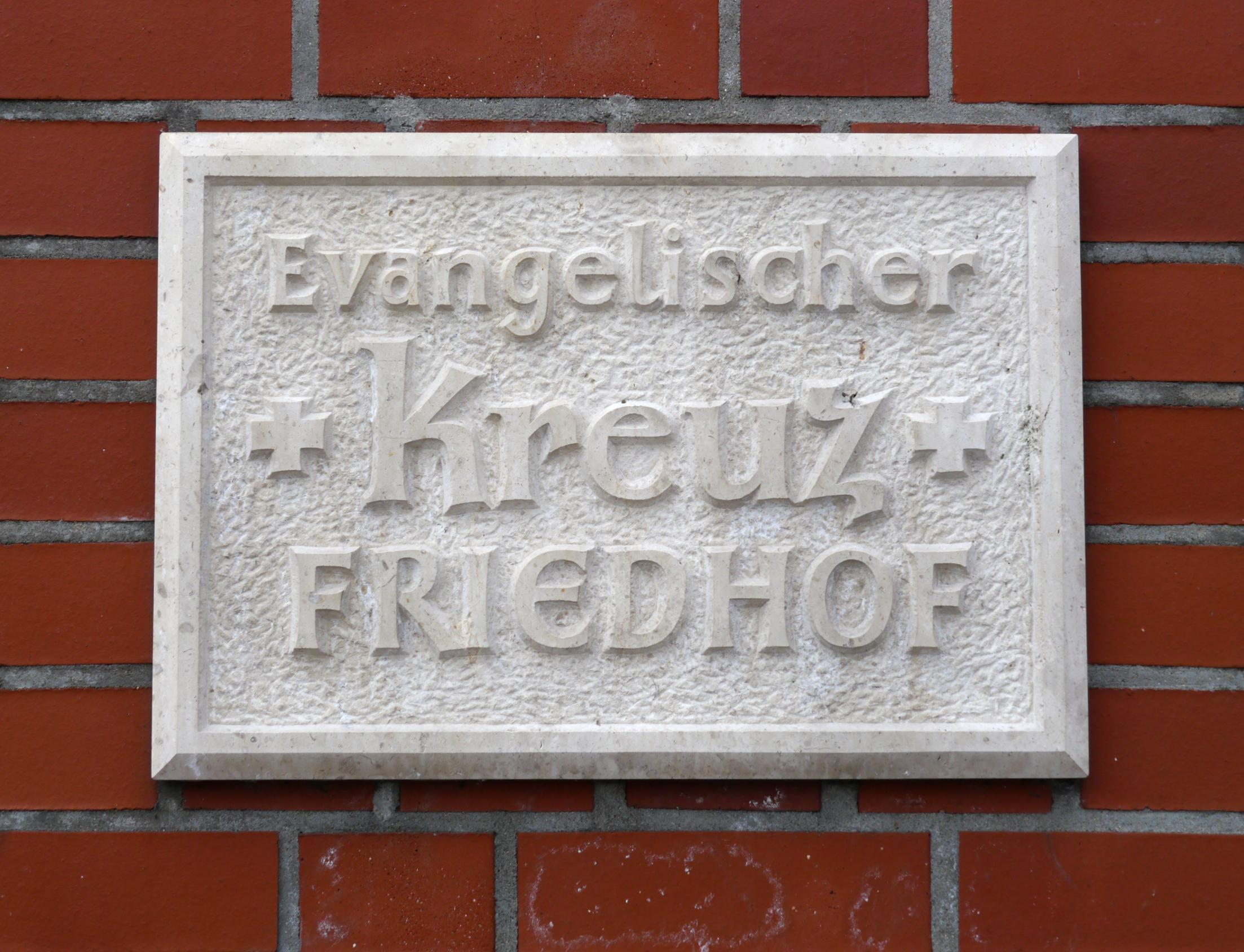 Tafel am Eingang vom Kreuz-Friedhof in Berlin-Lankwitz